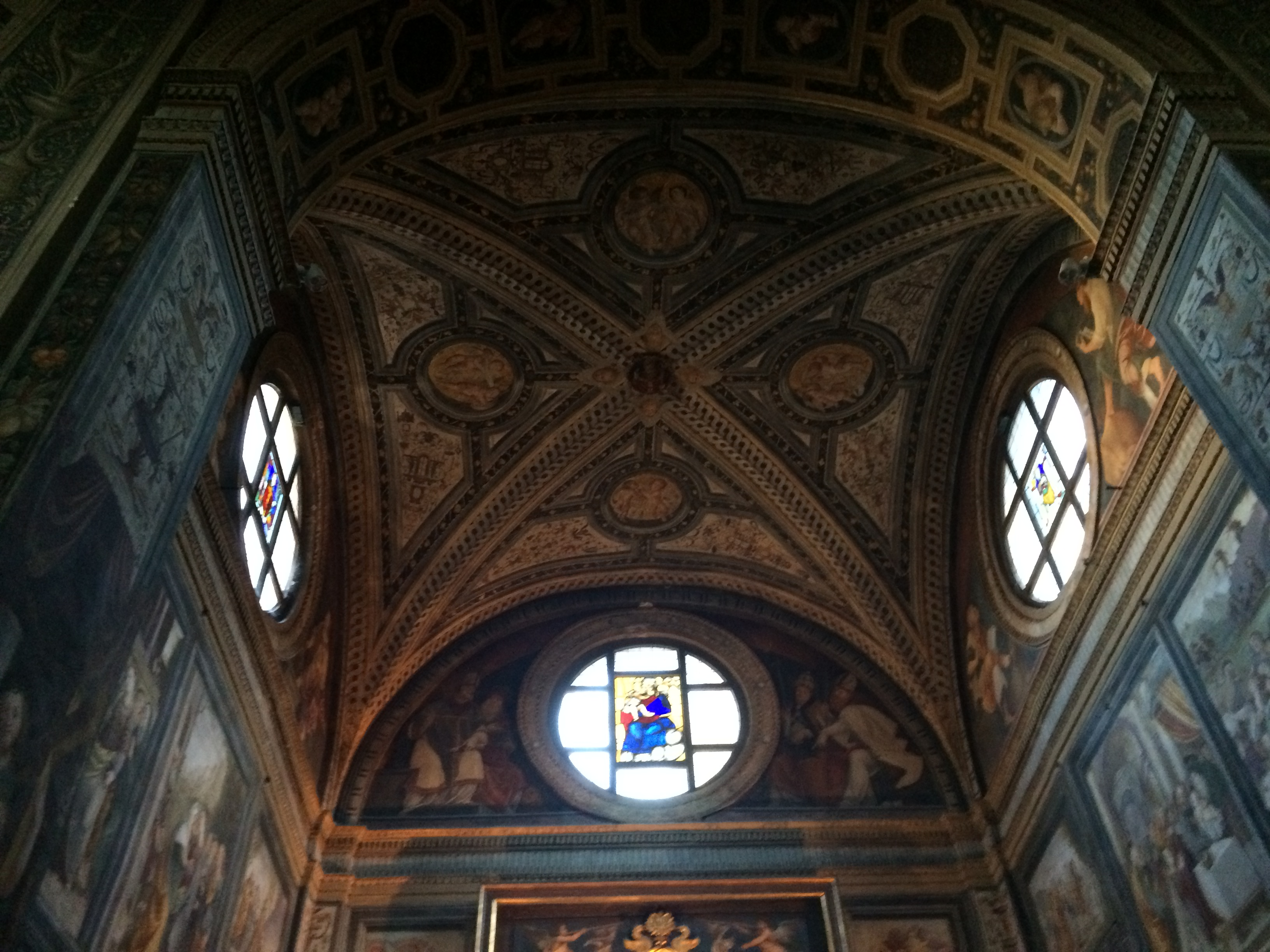 Volta della cappella maggiore della basilica di San Magno